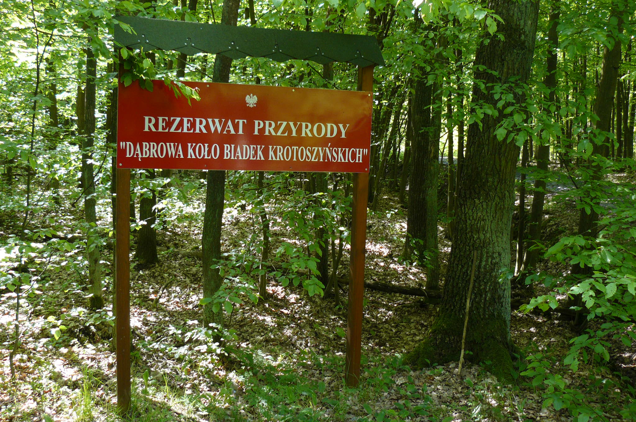 Obszar Chronionego Krajobrazu Dąbrowy Krotoszyńskie i Baszków-Rochy. Rezerwat Dąbrowa koło Biadek Krotoszyńskich.